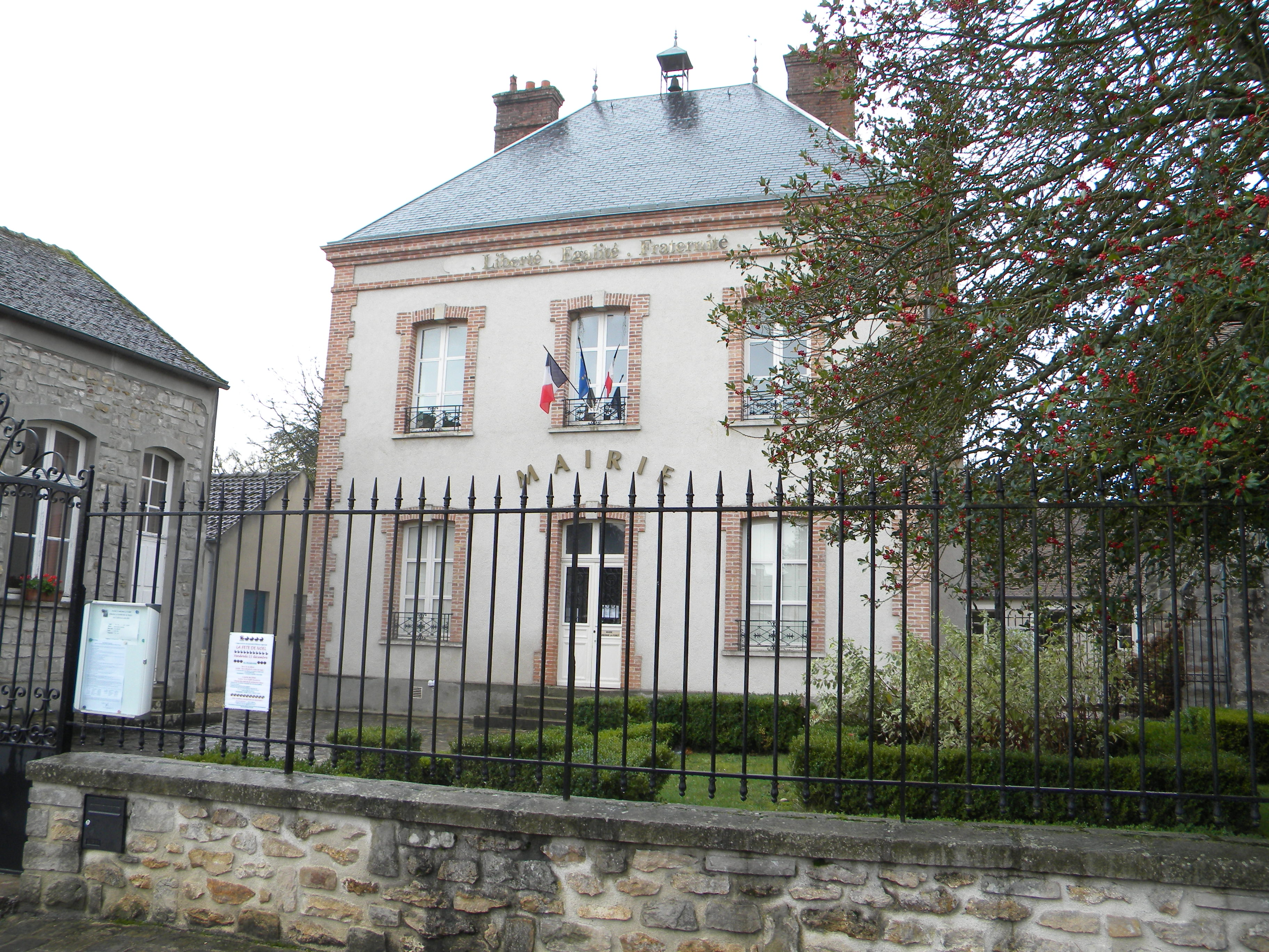 La Mairie d'Arbonne la Forêt